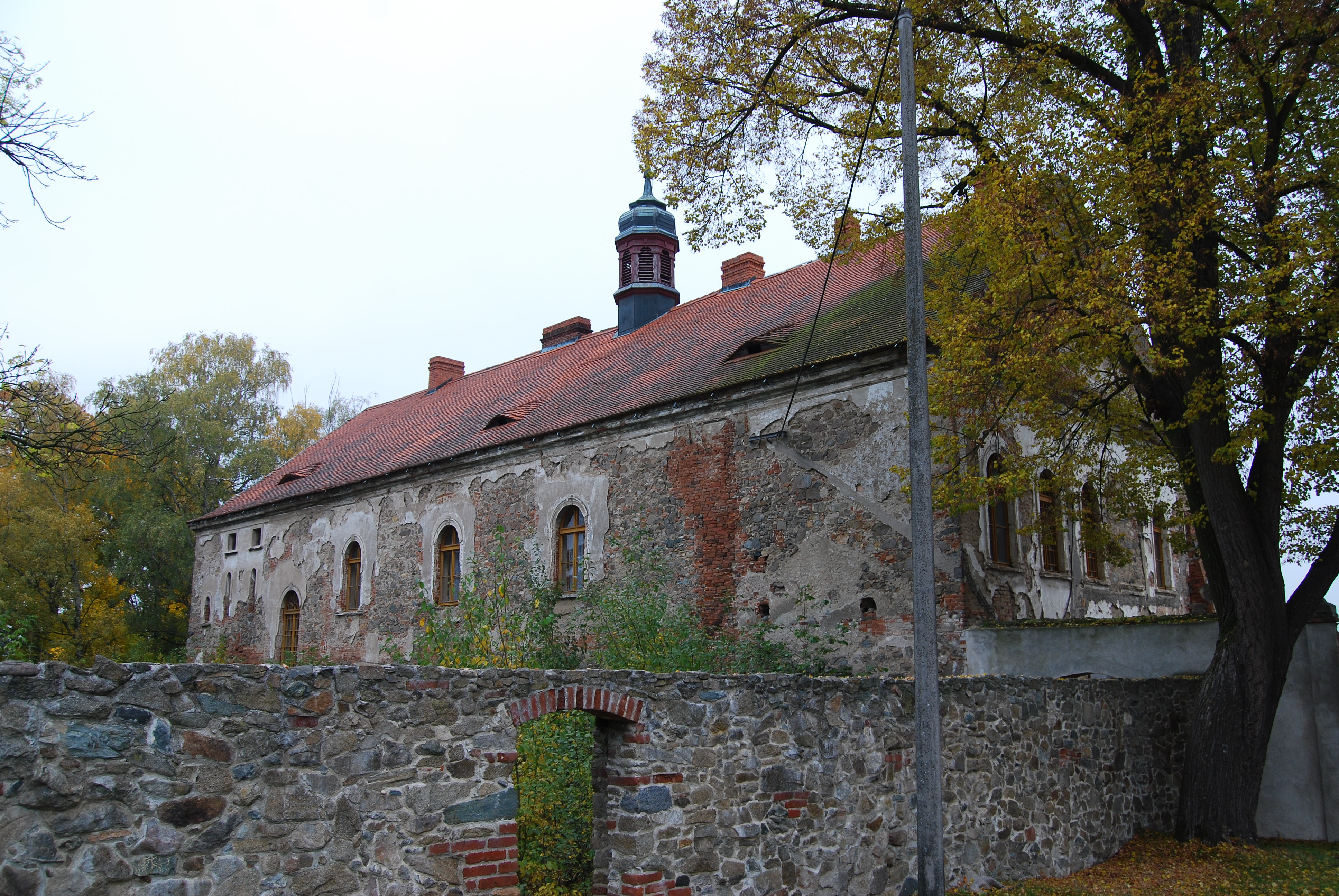 Zámek - Zduchovice 28. Obec Zduchovice v okrese Příbram, kraj Středočeský. Česká republika.